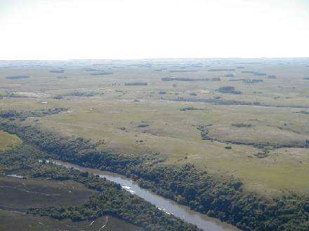 Cuenca media del Río Cuareim, R. O. del Uruguay